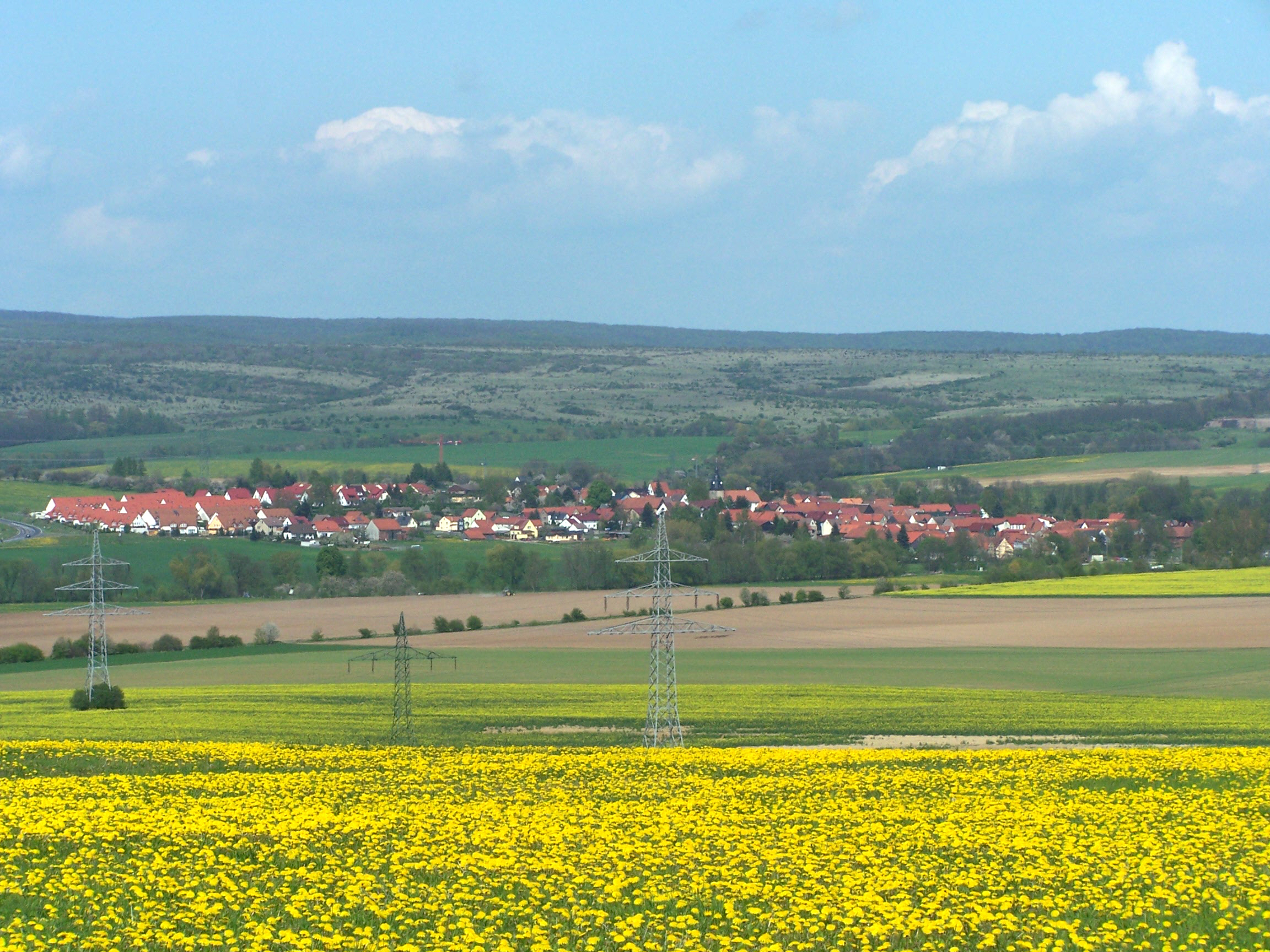 Großenlupnitz, Ansicht von Südwesten (Leimenberg)